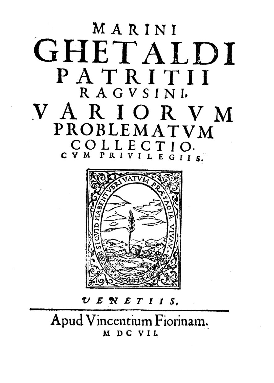 Marini Ghetaldi patritii Ragusini, Variorum problematum collectio. …. - Venetiis : apud Vincentium Fiorinam, 1607. - 72 p. : ill. ; 4º .